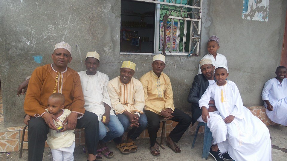 VILLE DE BANGOI-KOUNI